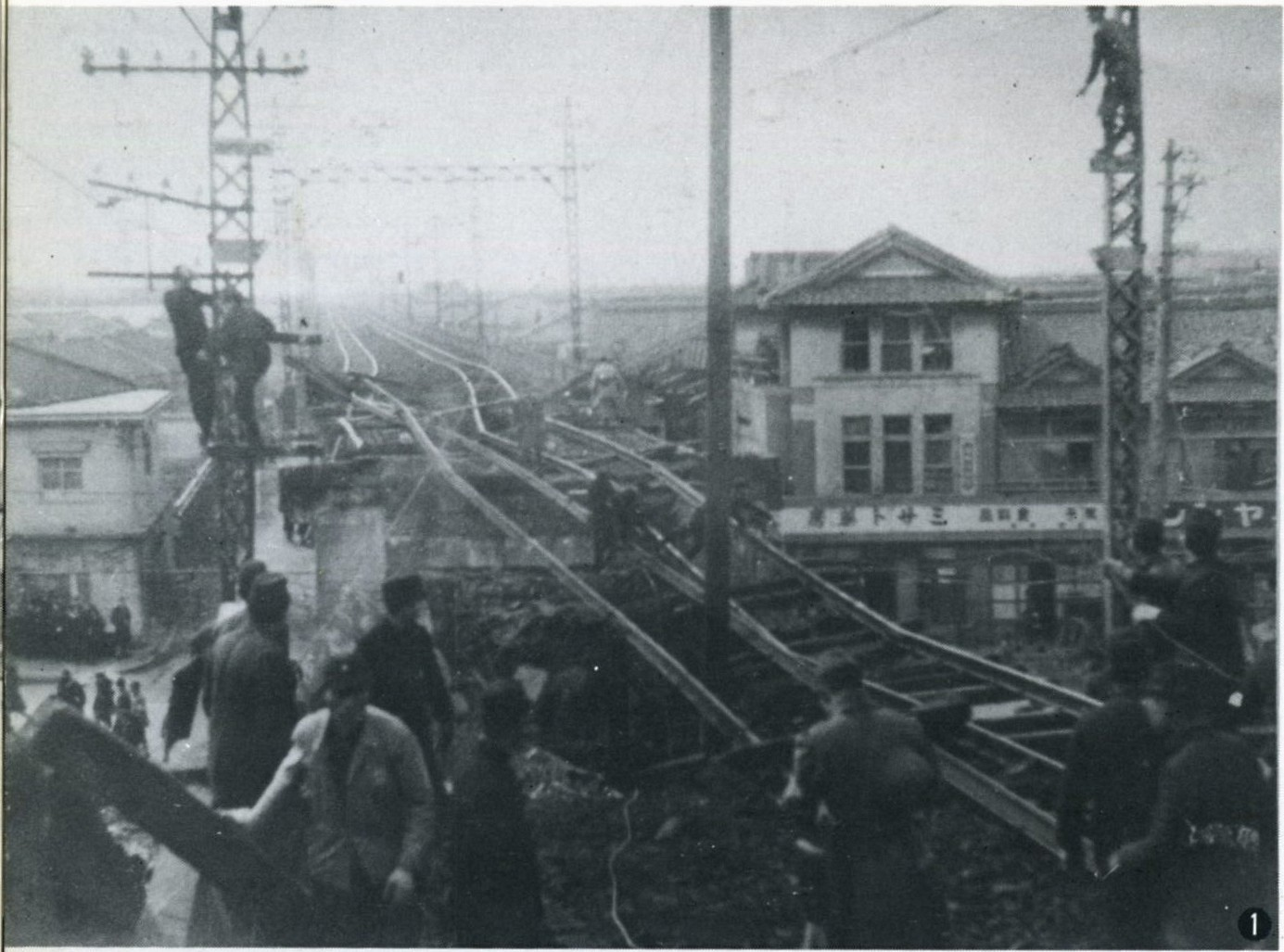 昭和20年(1945年)2月14日の空襲で被害を受けた阪和線美章園駅(大阪市阿倍野区)。写真掲載ページには「大阪空襲で直撃弾を受けた美章園駅(20・3)」と説明が付いているが、P177の年表では空襲を受けたのは「昭和20年3月11日」と誤った日付になっている。そのため3月の撮影では無い可能性がある。元の写真は京都鉄道博物館が所蔵している。